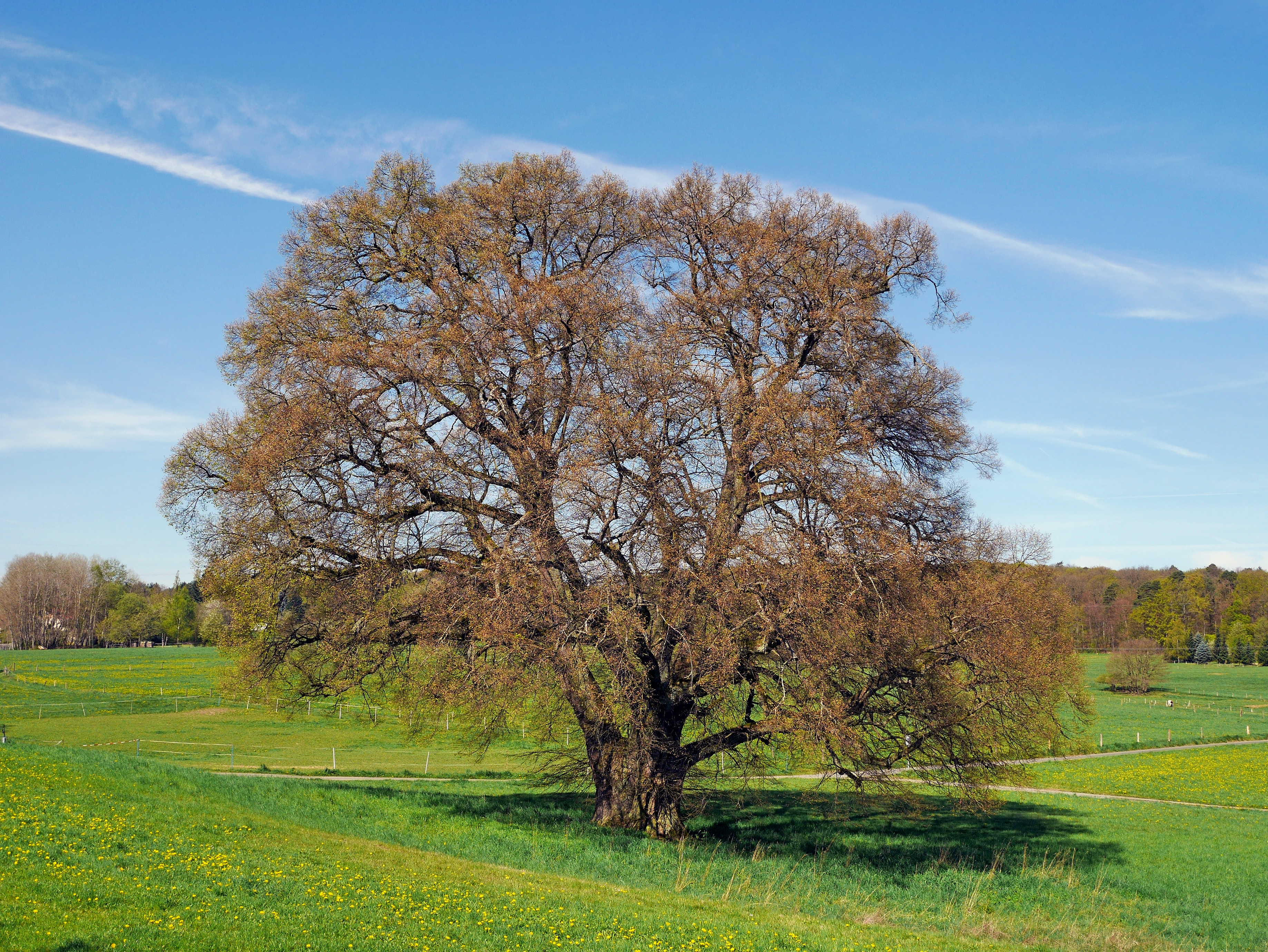 Die Brunnenlinde steht nördlich von Bellersdorf frei auf einer Wiese. Mit 7,82 Meter Stammumfang zählt sie zu den größten und schönsten Linden in Deutschland